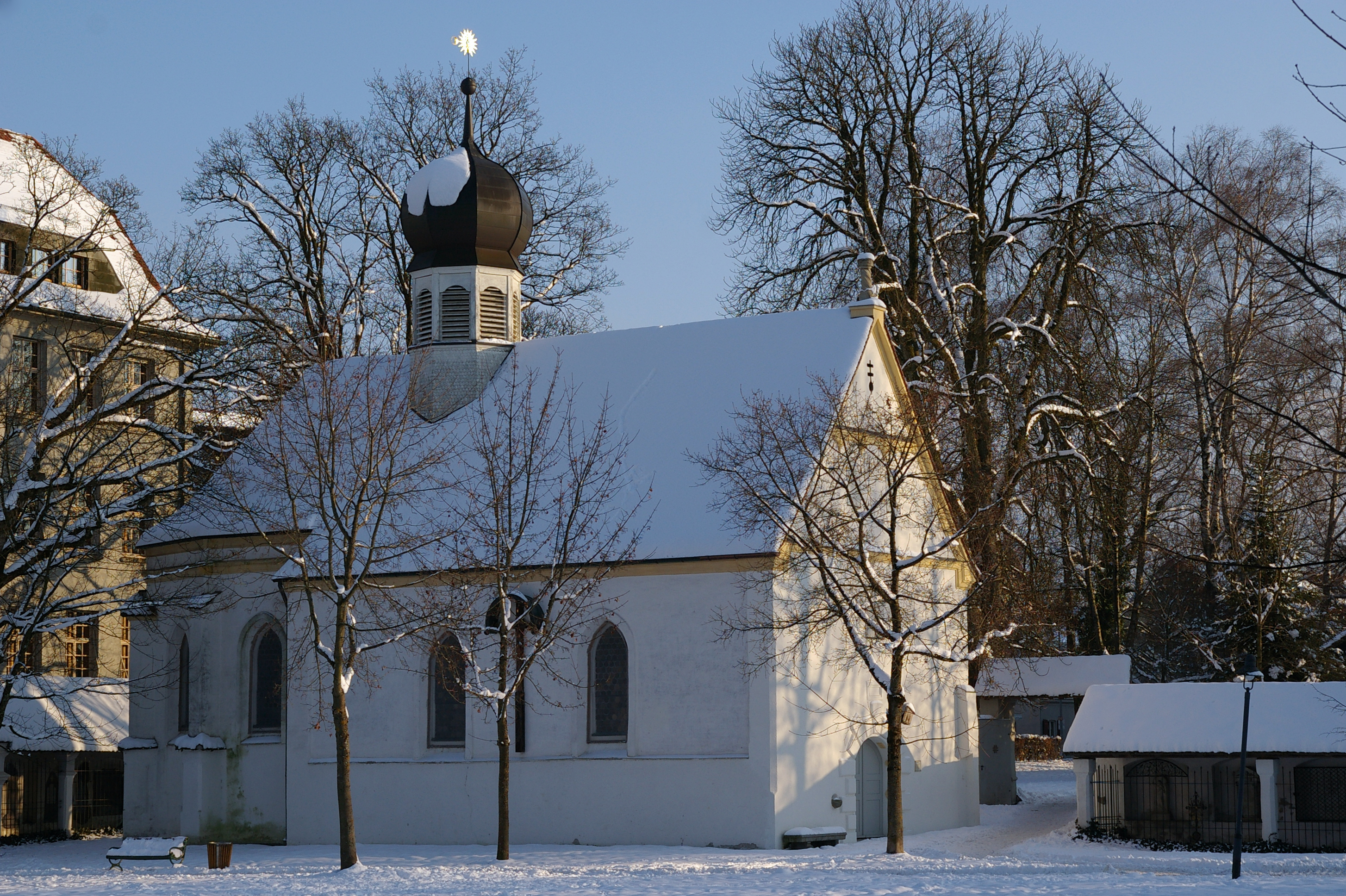 St. Rochus-Kapelle in Wangen im Allgäu